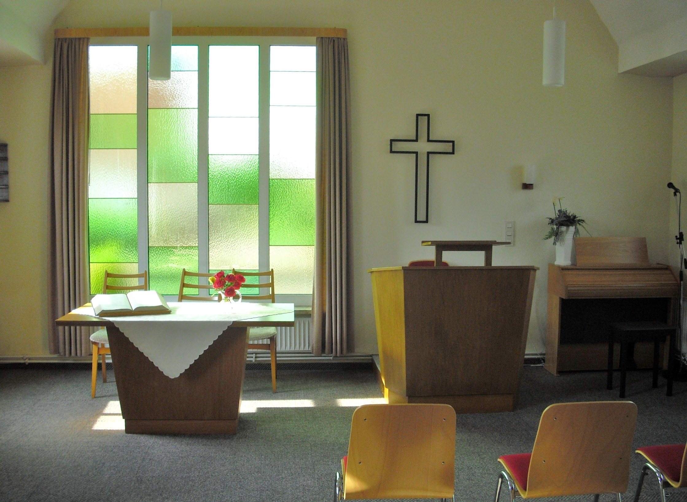 Baptistenkapelle Wymeer - Gottesdienstraum